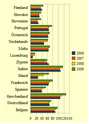 Schuldenquote im Vergleich zum BIP in % der Eurozone